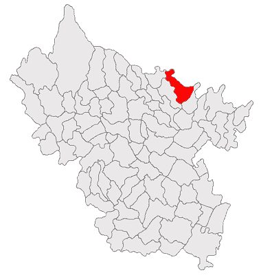 Categorie:Hărţi ale judeţului Buzău